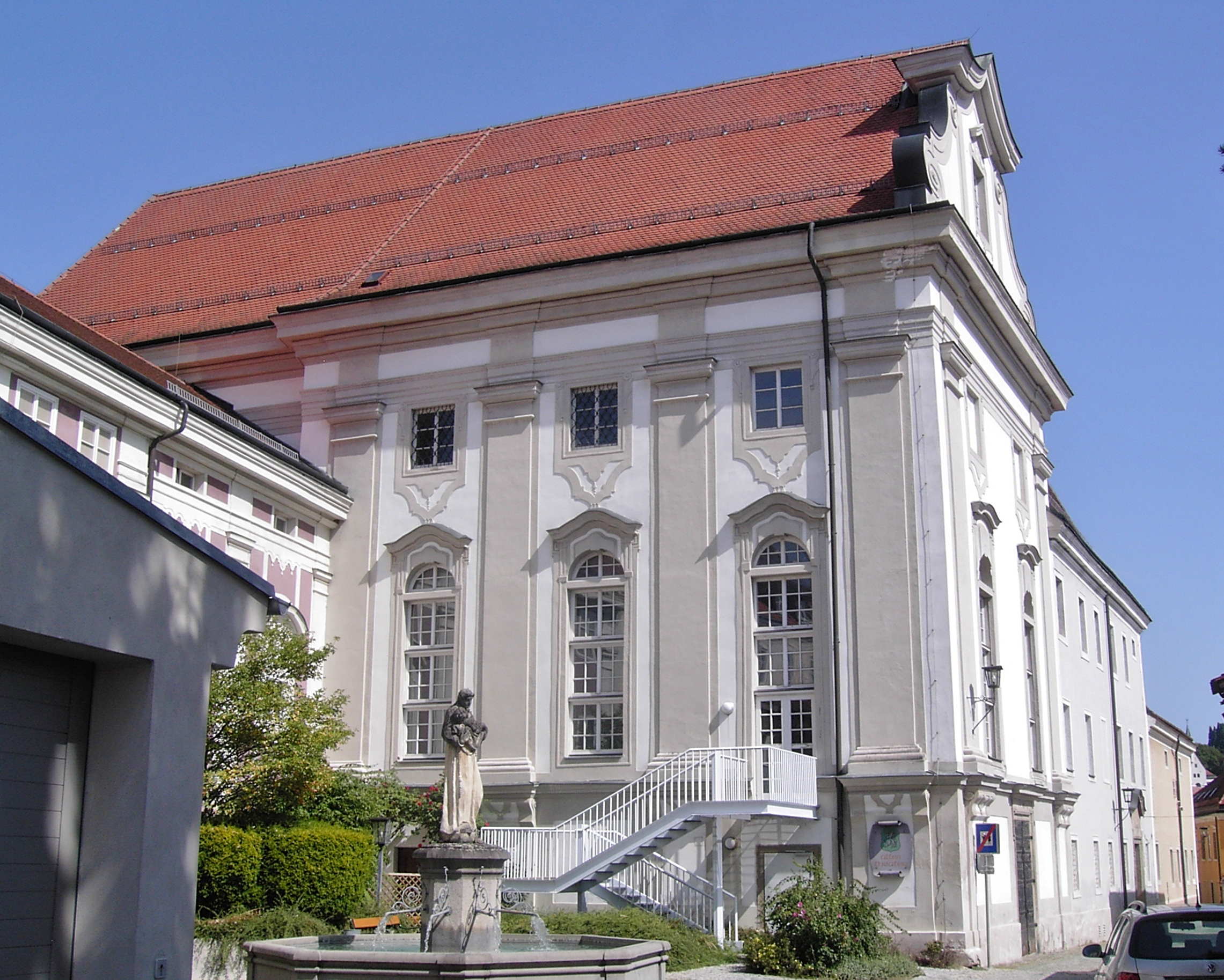 Steyr Handel Mazzetti-Promenade 3, Altes Stadttheater, ehem.Teil des Cölestinerinnenkloster, ehem.Klosterkirche, berggassenseitige Ansicht